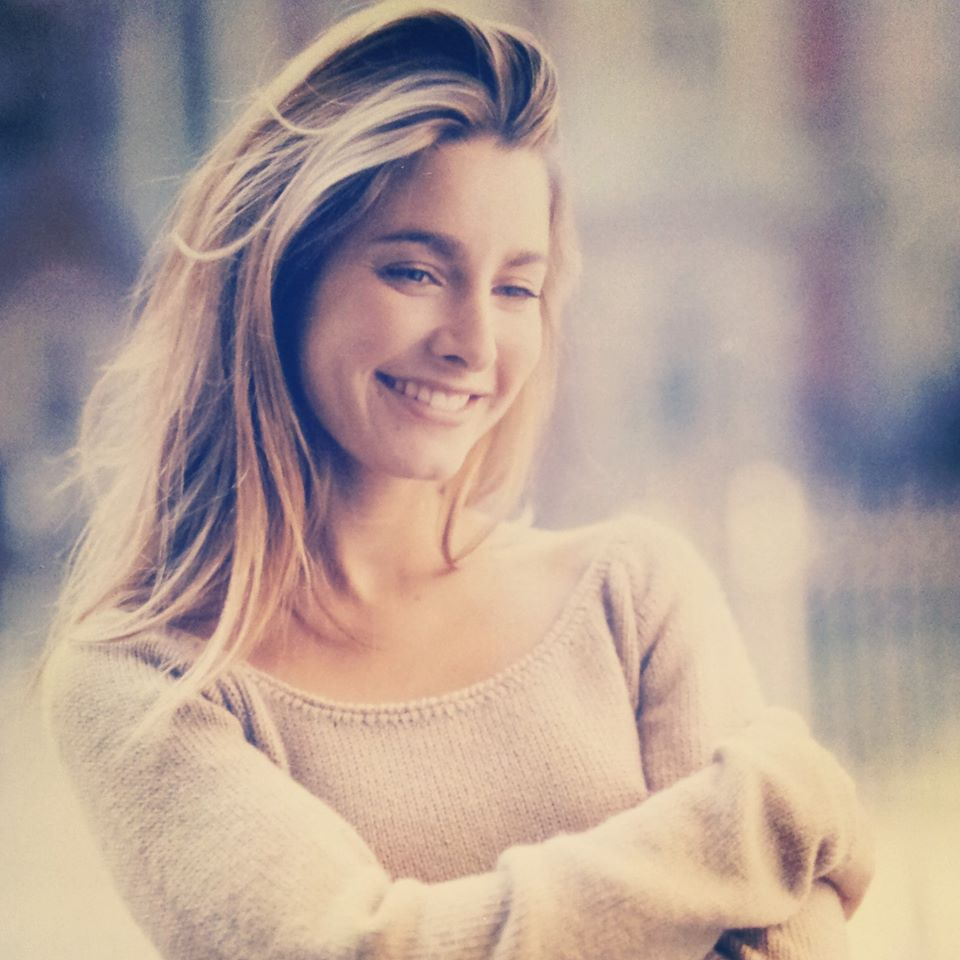 Estefanía Muñiz Villa Guionista